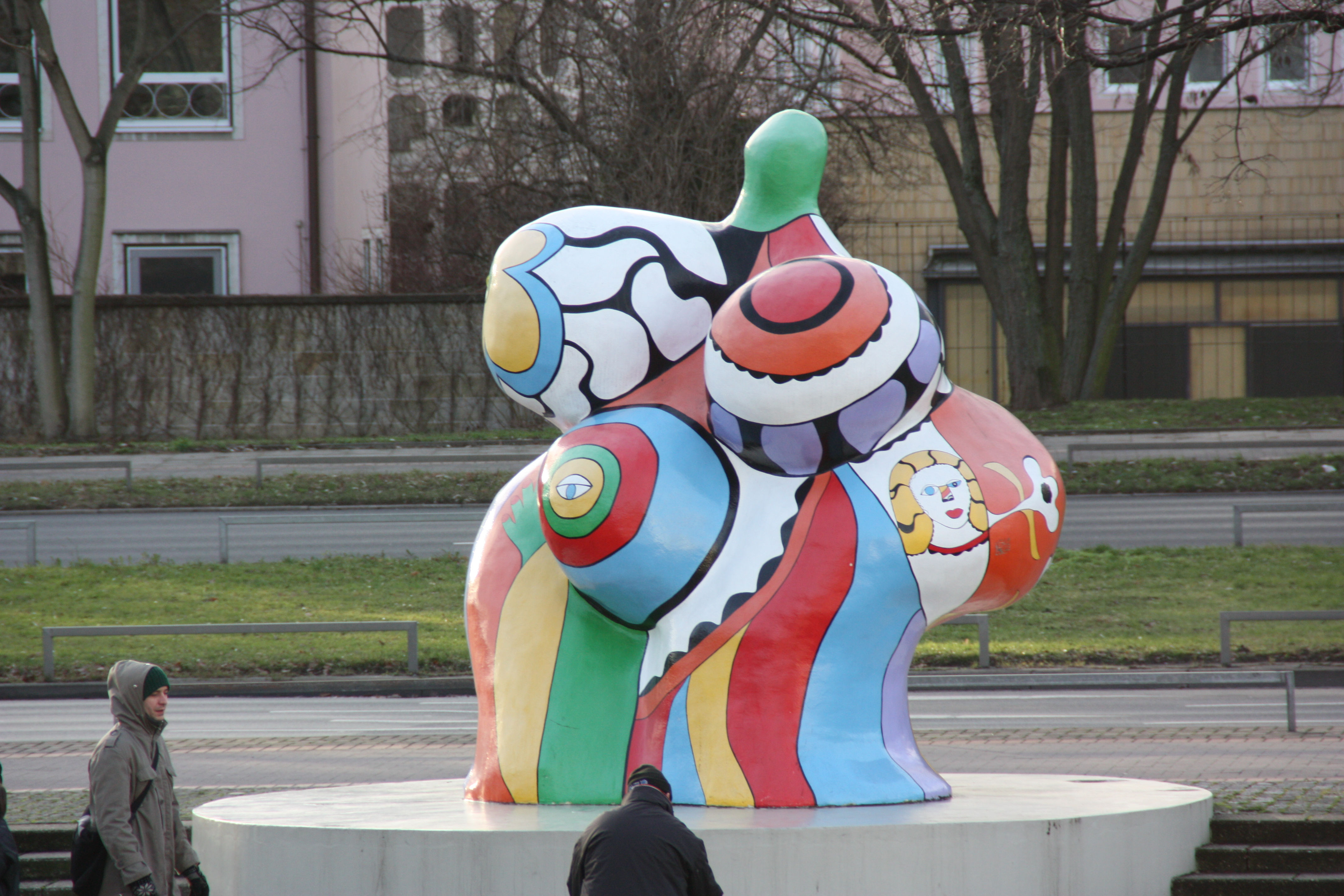 Die Nanas, Plastik der französischen Künstlerin Niki de Saint Phalle (1930–2002) in Hannover